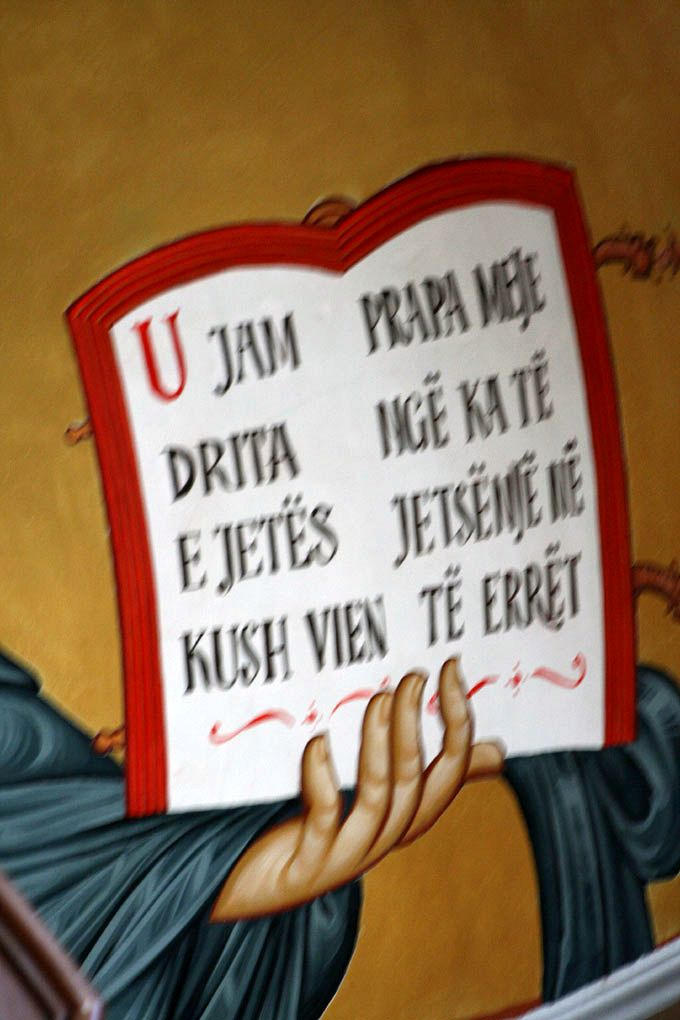 Particolare dell'affresco bizantino di Cristo Pantocratore della Chiesa di San Giorgio Megalomartire